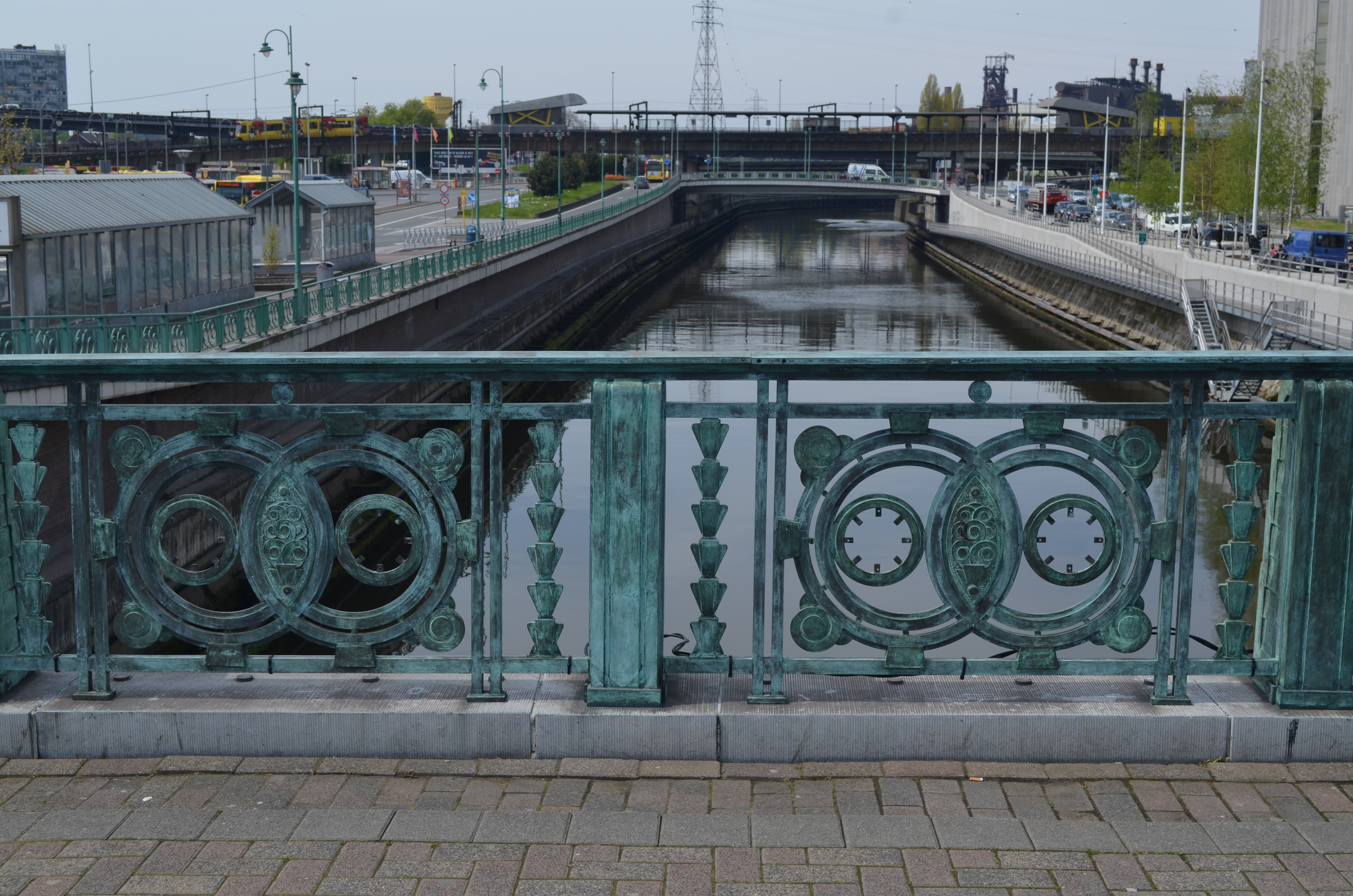 Charleroi (Belgique) - pont roi Baudouin sur la Sambre